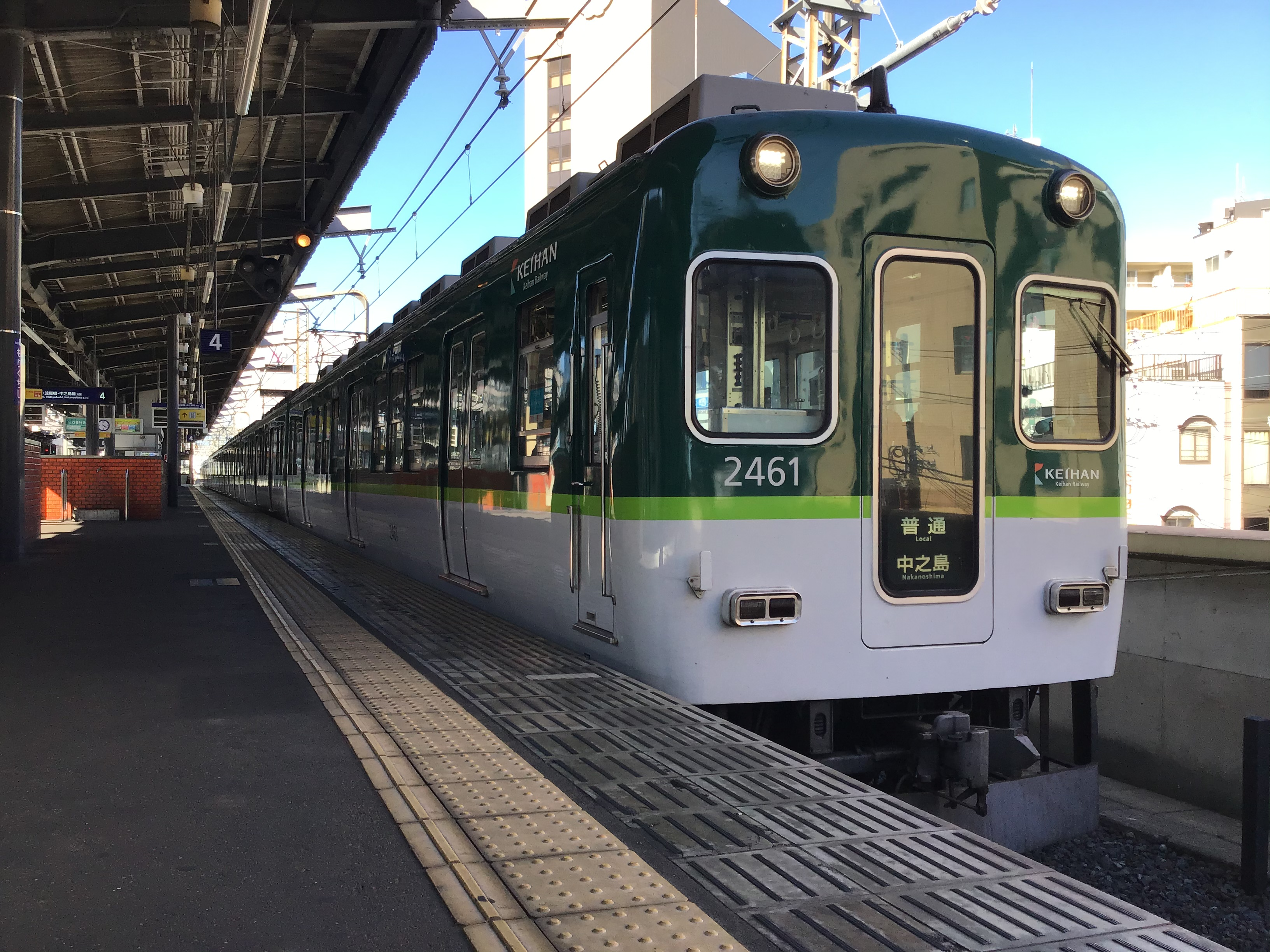 新塗装化された京阪2461